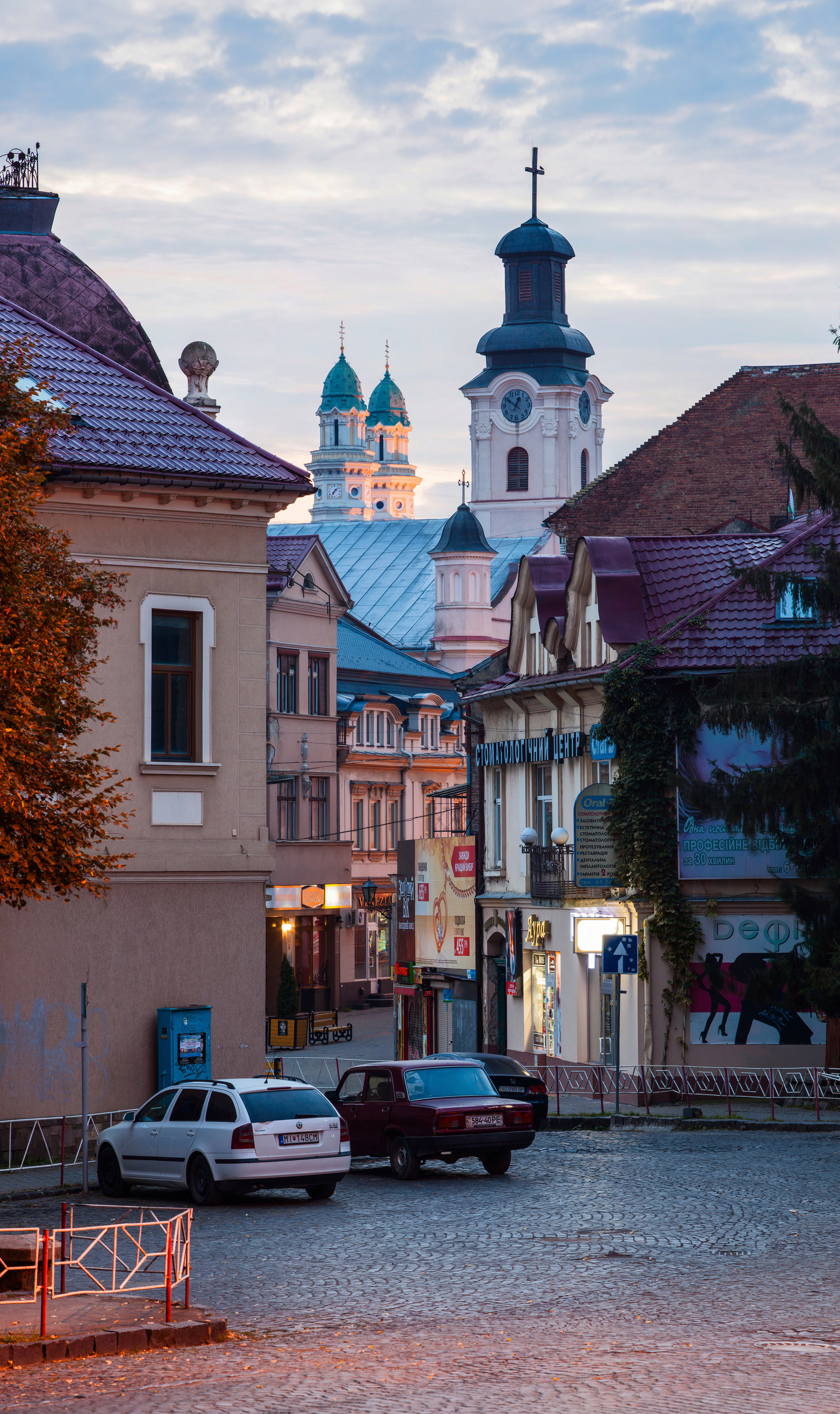 Римо-католицький костел, Ужгород, вул. Волошина, 9